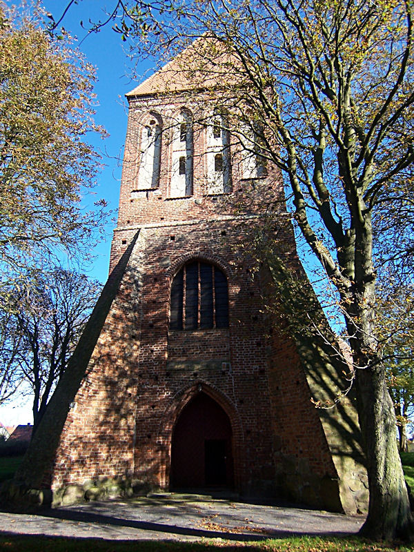 Kirche in Richtenberg, Mecklenburg-Vorpommern